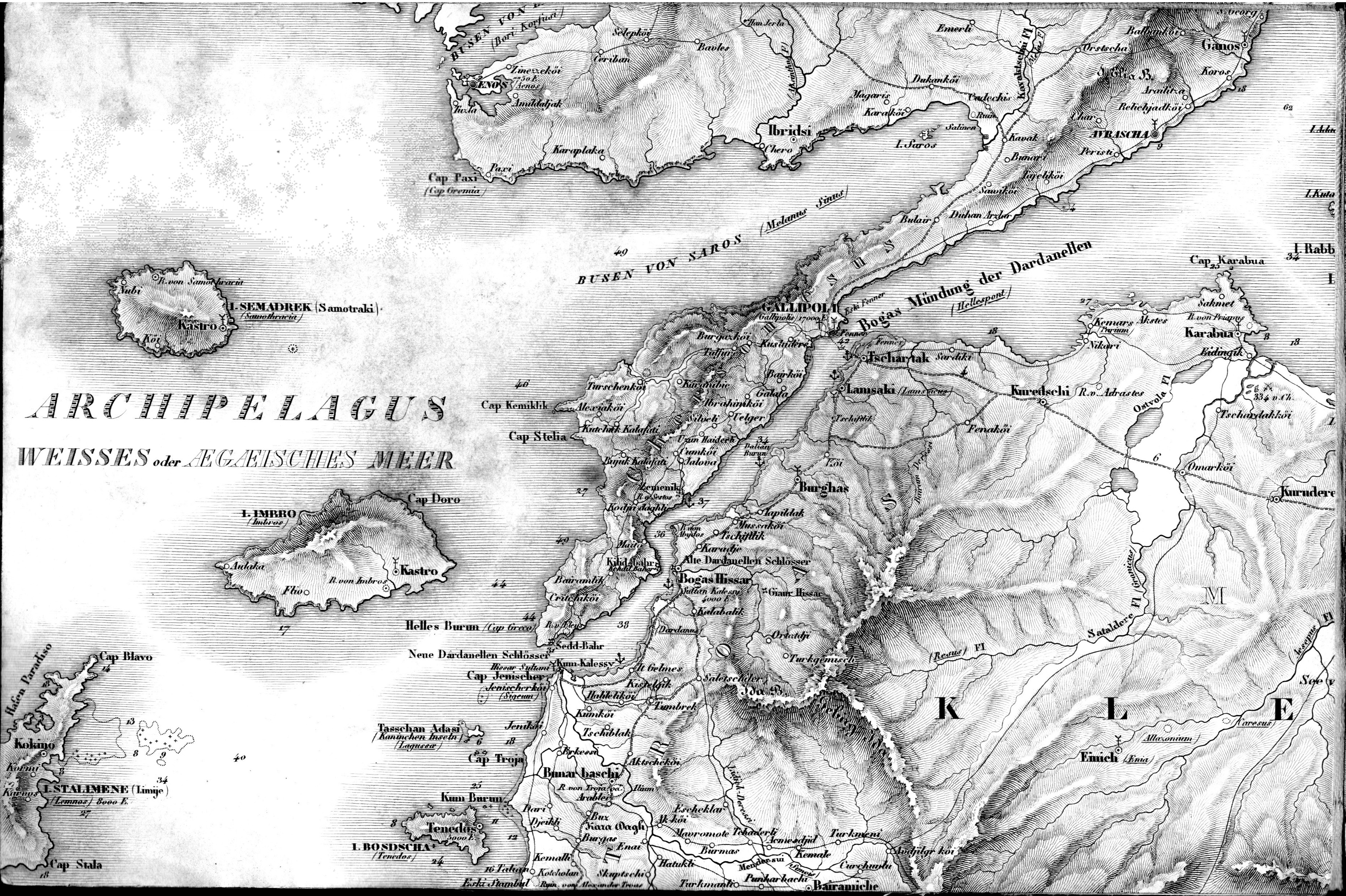 Carte der Europæischen Türkey nebst einem Theile von Kleinasien in XXI Blättern, k.k. österr. Generalquartiermeisterstab, 1829.